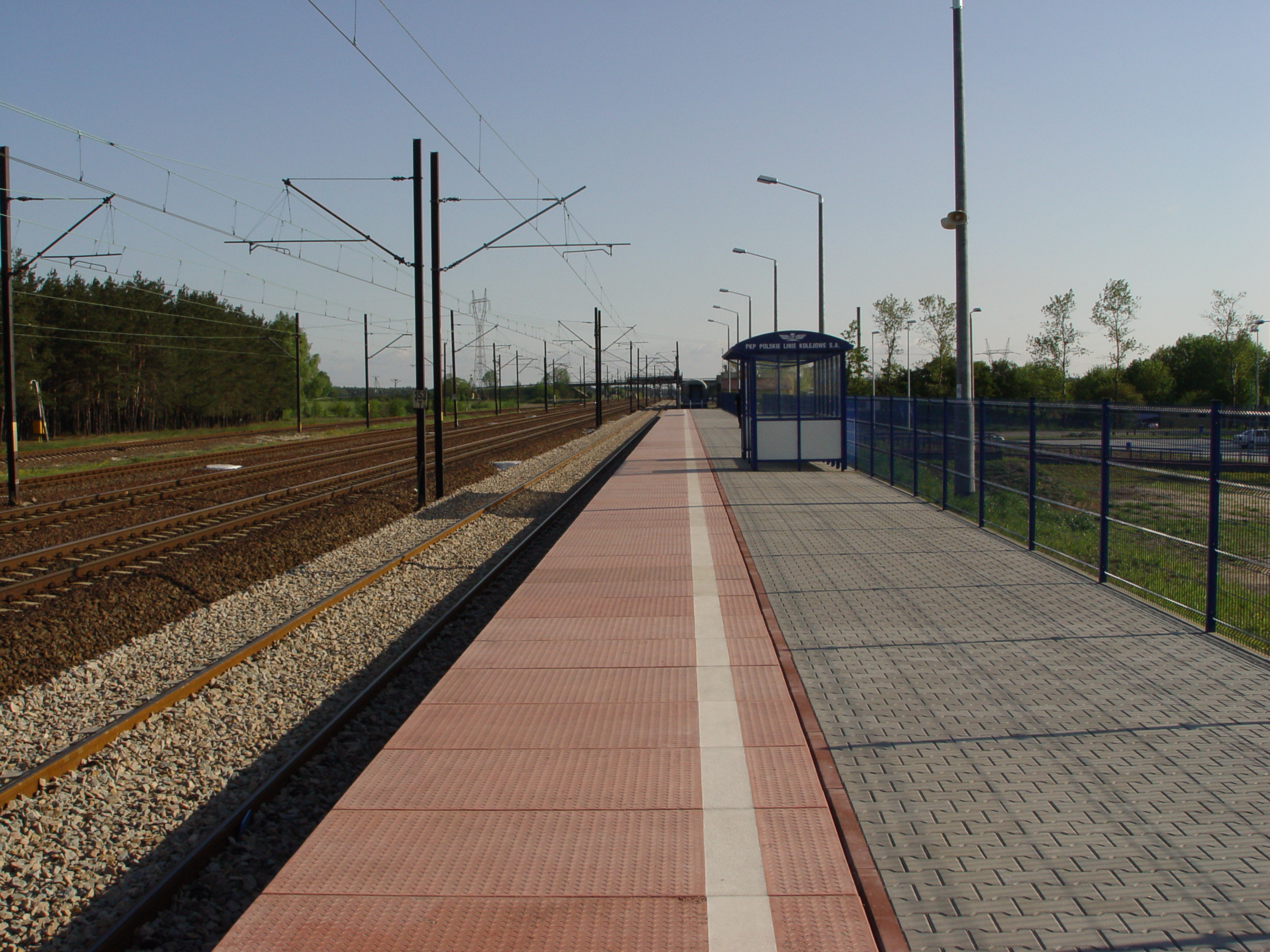 Włoszczowa Północ - przystanek